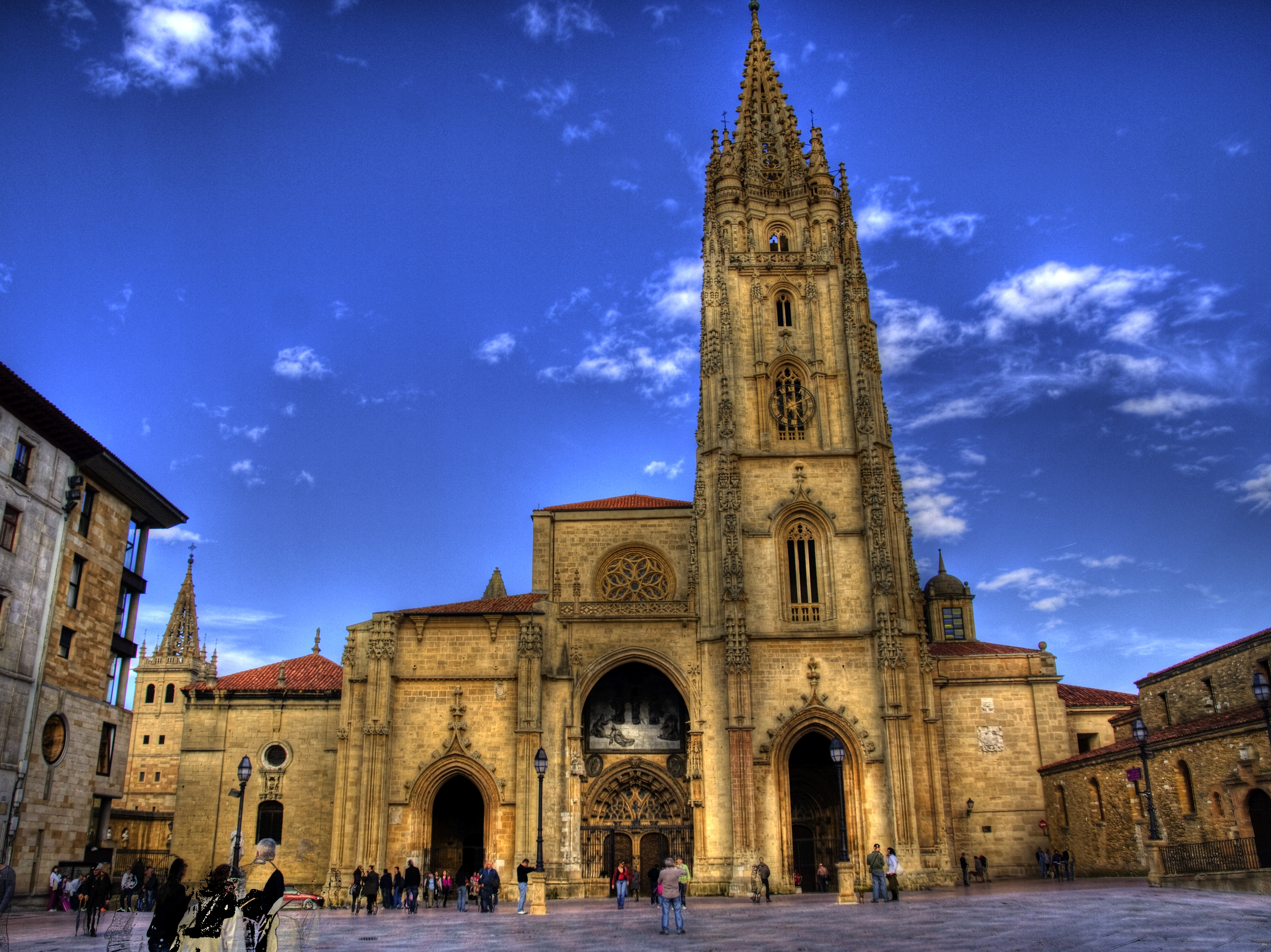 Catedral de Oviedo, Asturias. España.